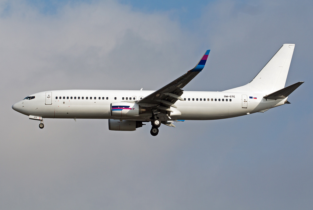 landing